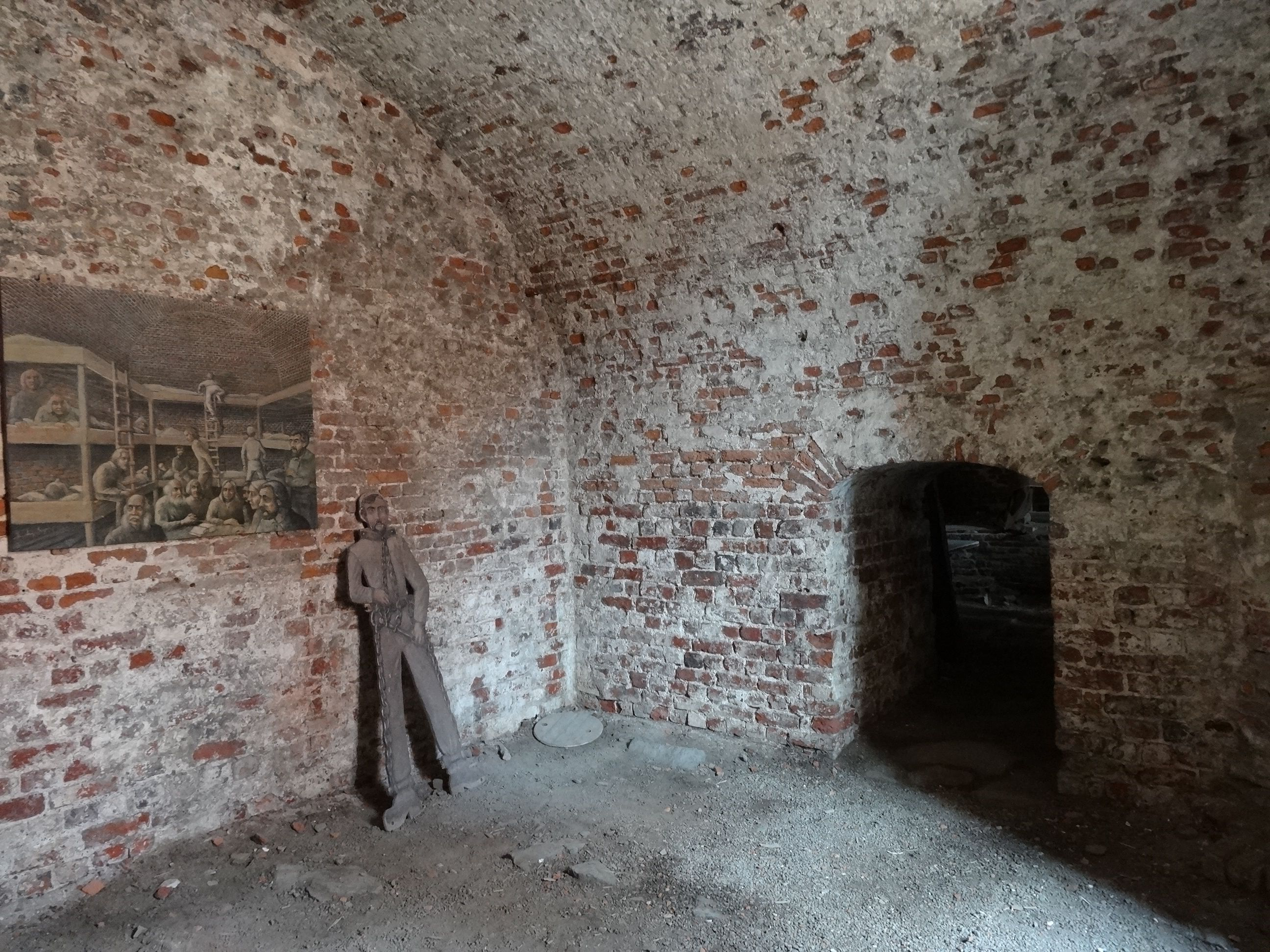 Interiör från fångvalv på Nya Älvsborg. Bilden på väggen visar hur fångvalven såg ut då de användes. Till höger visas en fånge klädd i järn.